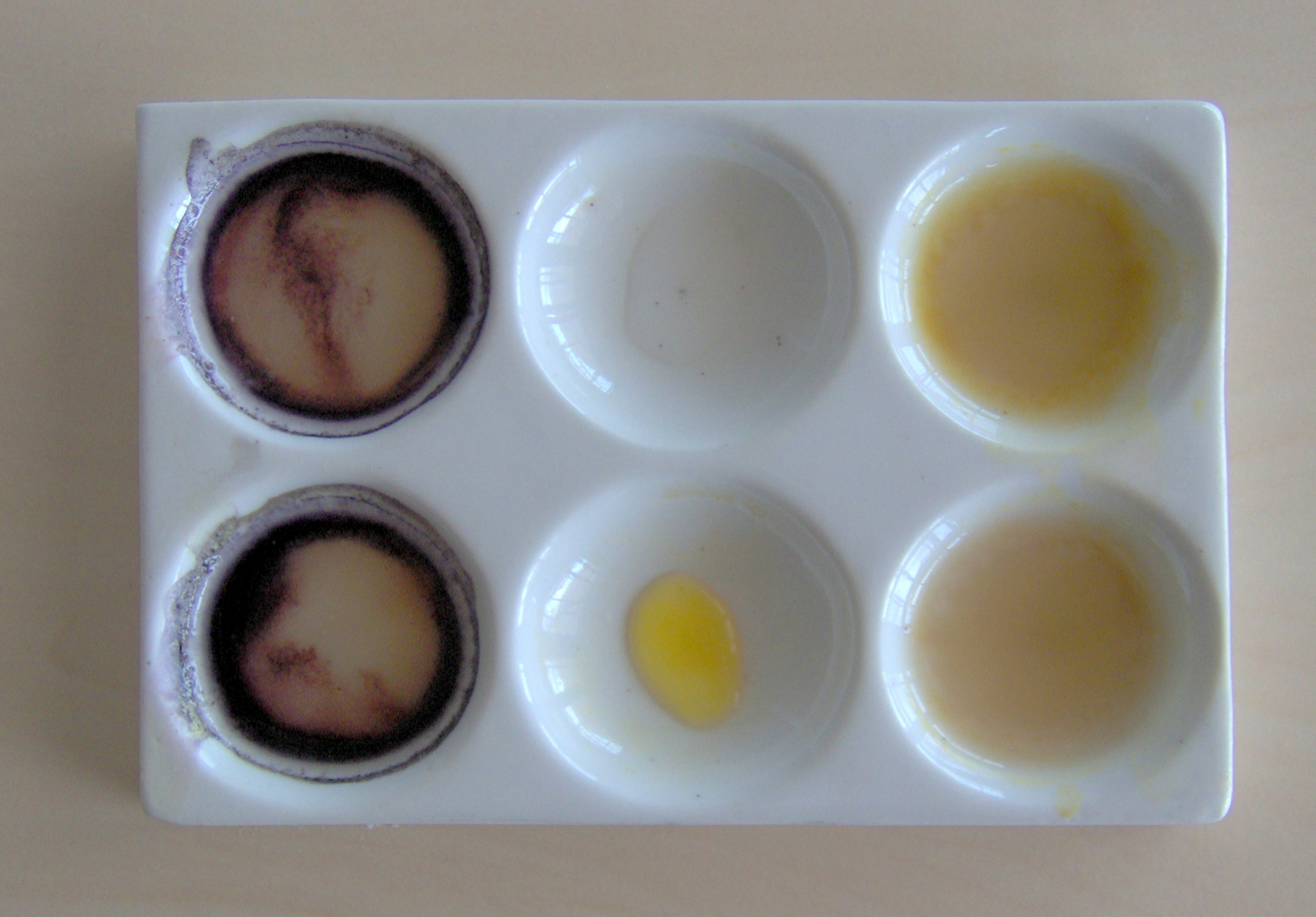 Im Bild sind die Ergebnisse zweier Iodproben beim Bierbrauen zu sehen. In den beiden linken Vertiefungen ist in der Maische noch Stärke vorhanden. In den beiden rechten Vertiefungen ist die Stärke vollständig umgewandelt.